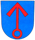 Vémyslice - znak obce.